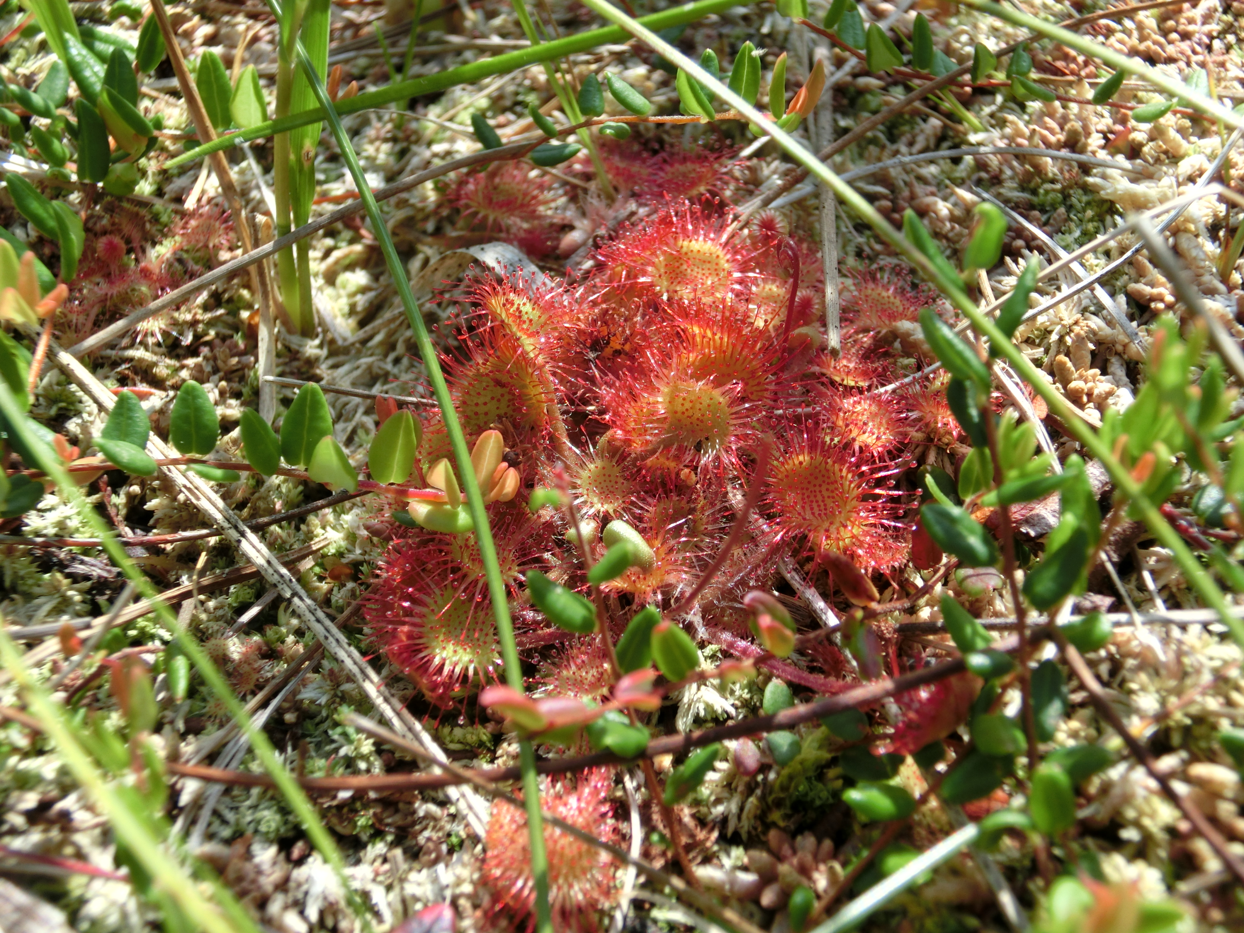 Deutschland - Baden-Württemberg - Landkreis Sigmaringen: Pfrunger-Burgweiler-Ried, Rundblättriger Sonnentau (Drosera rotundifolia)